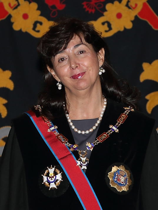 Albacete, 28-02-2014. - La presidenta del Gobierno de Castilla-La Mancha, María Dolores Cospedal, y el presidente del Tribunal Superior de Justicia de Castilla-La Mancha, Vicente Rouco, imponen la Gran Cruz de la Orden de San Raimundo de Peñafort a la magistrada Concepción Espejel Jorquera.